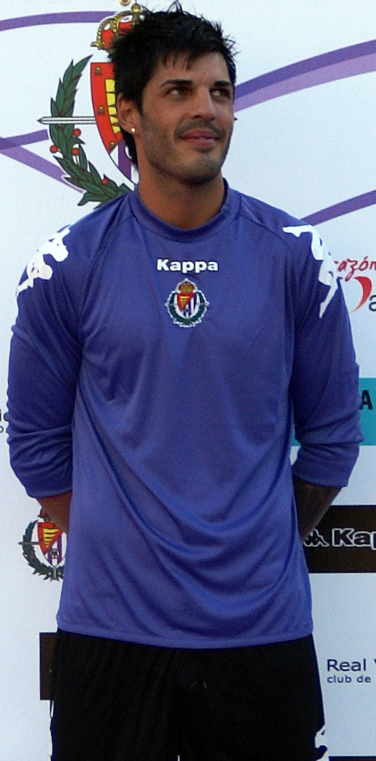 Presentación nuevas camsiets del Real Valladolid